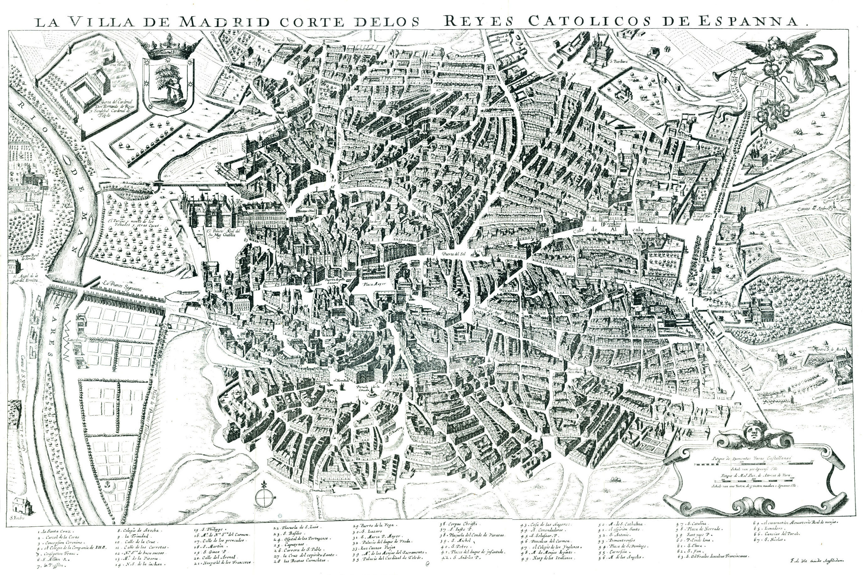 'La Villa de Madrid Corte de los Reyes Católicos de Espanna' entre 1622-1635. Queda documentado que se aprobó su impresión en septiembre de 1622 y se realizó en 1623. El plano, «dibujado en perspectiva caballera», está dividido en dos planchas que dan una idea aproximada del Madrid de los años 1614 a 1622. Se considera el mapa conocido más antiguo de la Villa. Esta es una reedición del grabador holandés Frederic de Witt, hacia 1635.(Mapa de Antonio Mancelli 1622-1635 Fuenteːbibliotecavirtualmadrid )